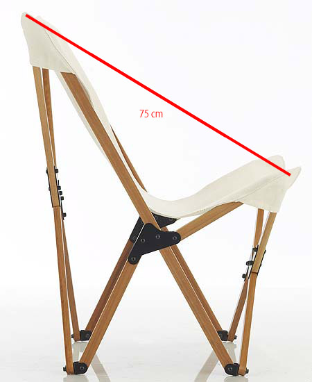 Io sono l'autore dell'immagine. Rilasciata secondo le Creative Commons 2.5. L'uso prevede citare la fonte e l'autore. Sedia Tripolina, vista laterale.